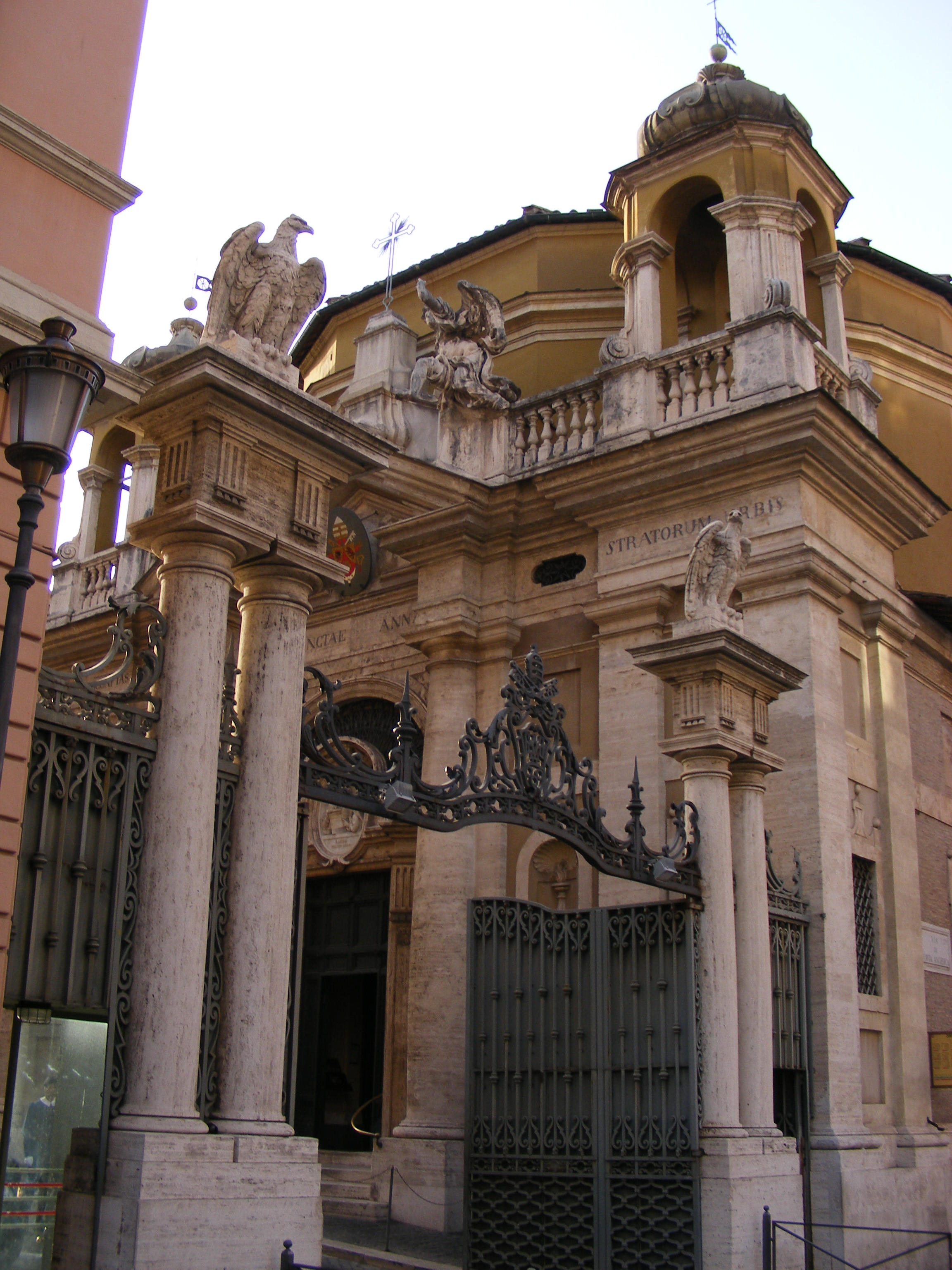 Chiesa di Sant'Anna dei Palafrenieri, Città del Vaticano.